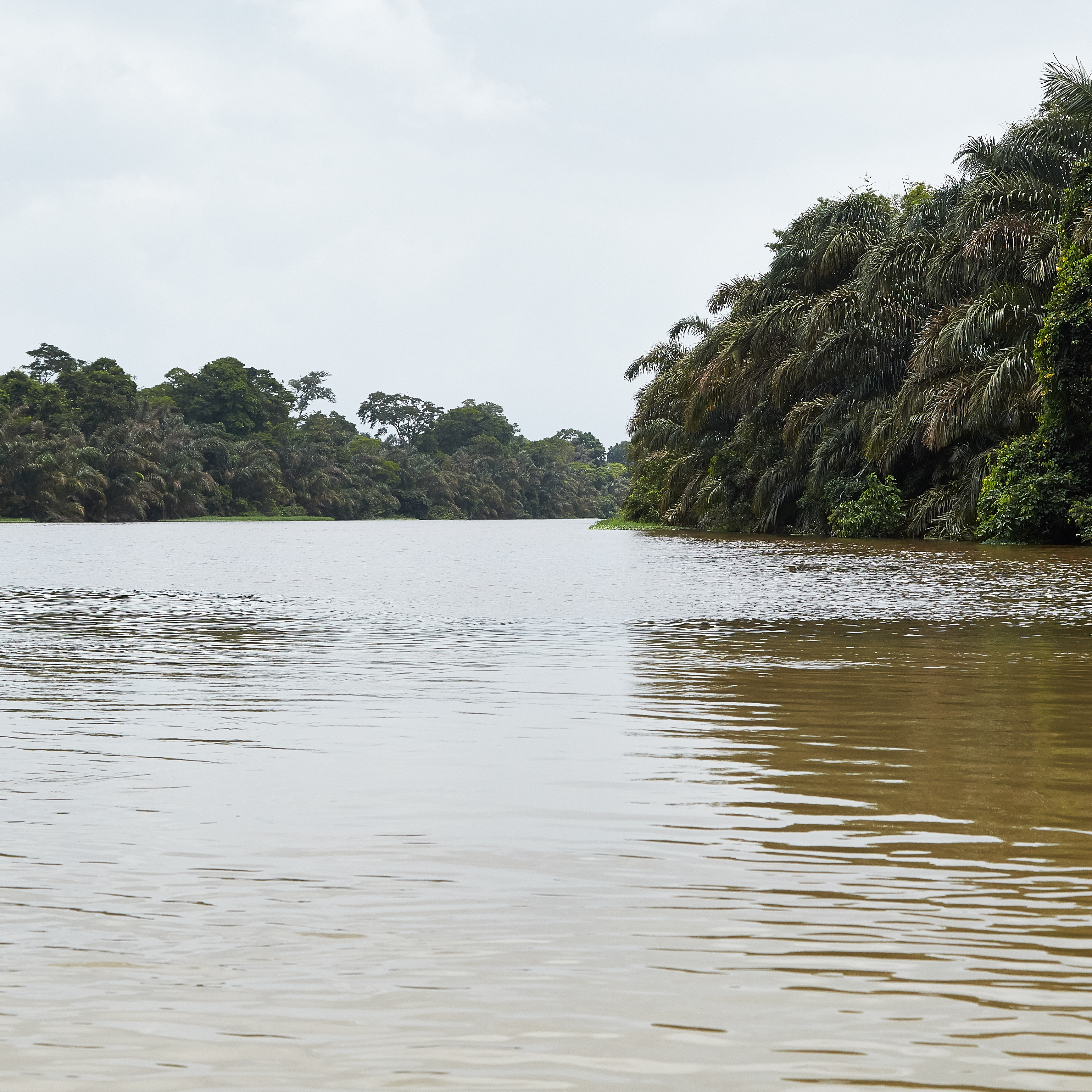 Río la Suerte, Limón, Costa Rica